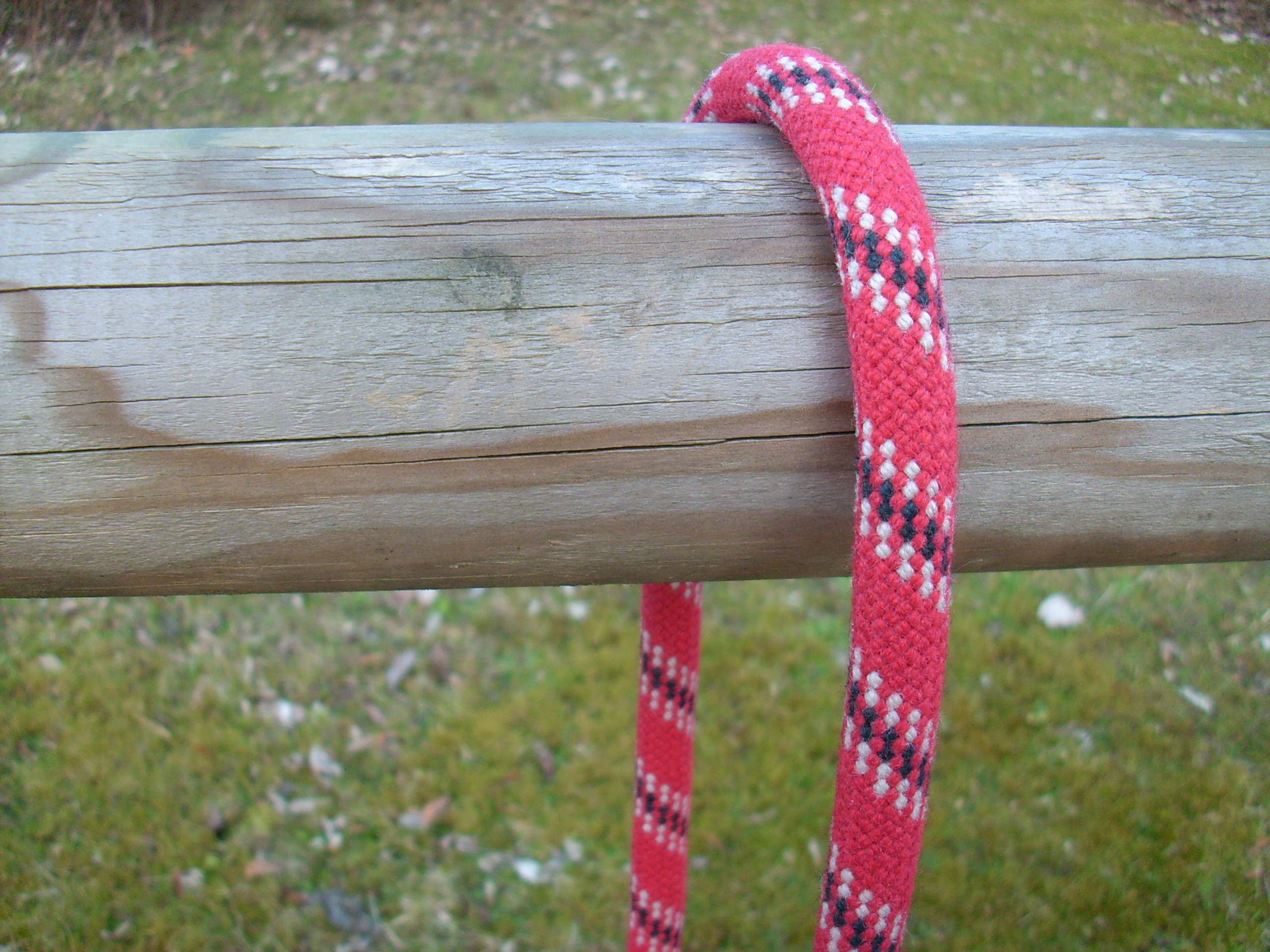 halber.